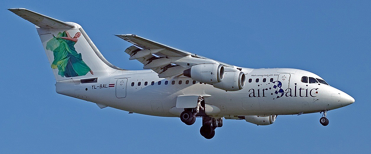 Avro RJ70 der Air Baltic mit freundlicher Genehmigung von Thomas Drebert